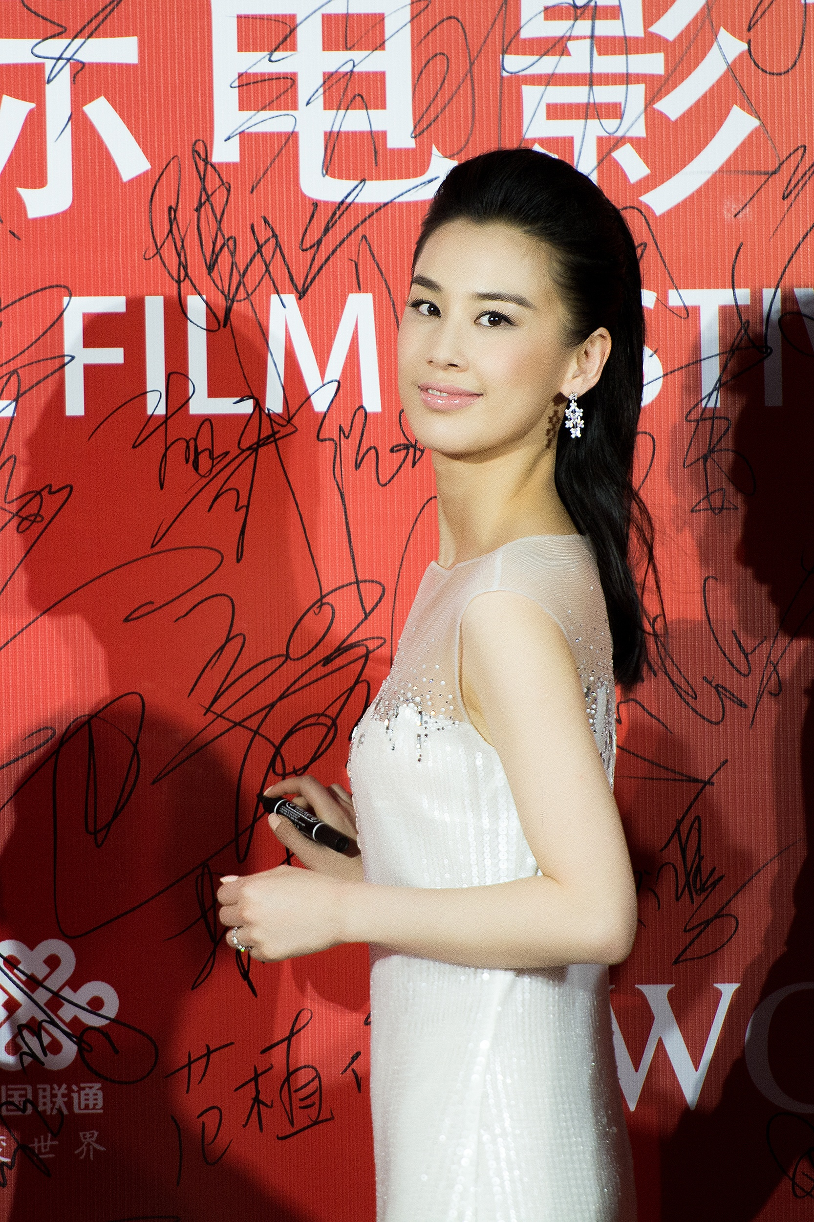 北京电影节闭幕红毯上随拍。（干这种活儿还得全幅啊，D7100高感还是差点意思，将就看吧。）